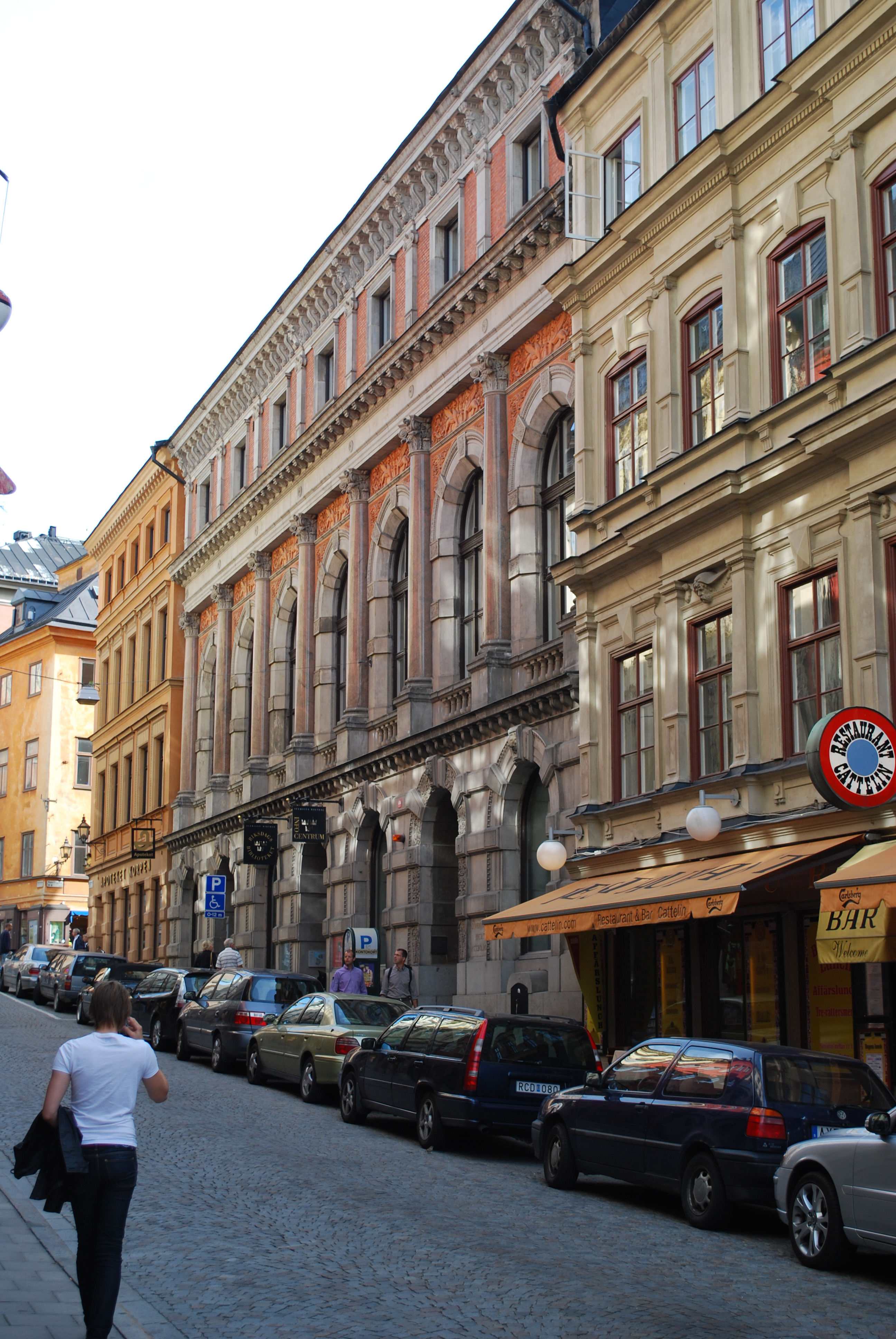 Storkyrkobrinken 7, Stockholm & JV